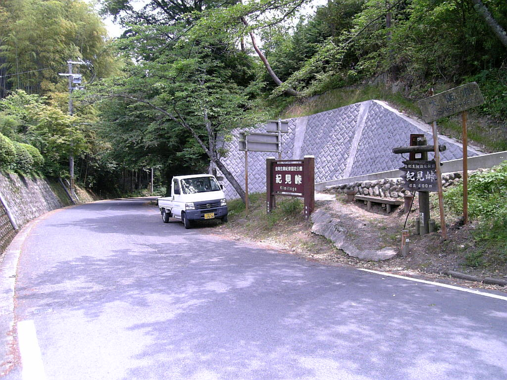 紀見峠（大阪府・和歌山県境）